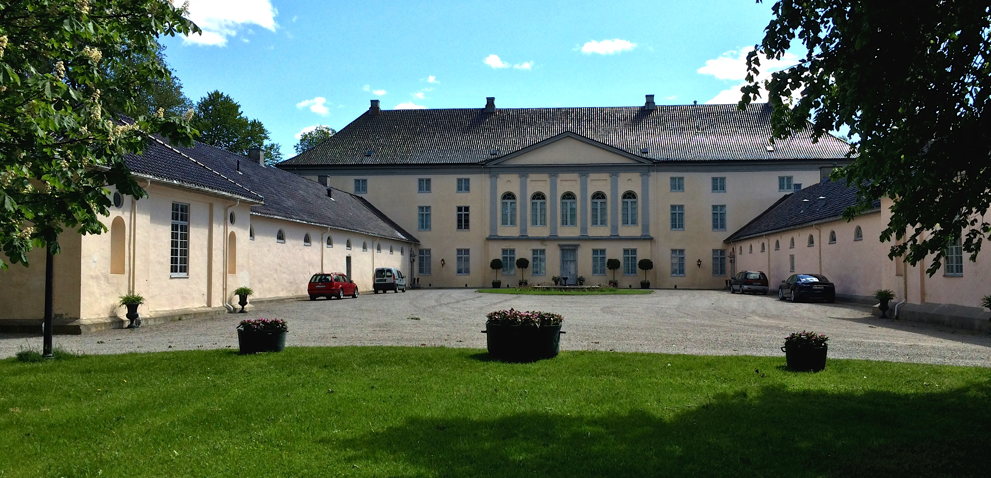 Borggården på Jarlsberg hovedgård i Tønsberg kommune i Vestfold 5. juni 2015